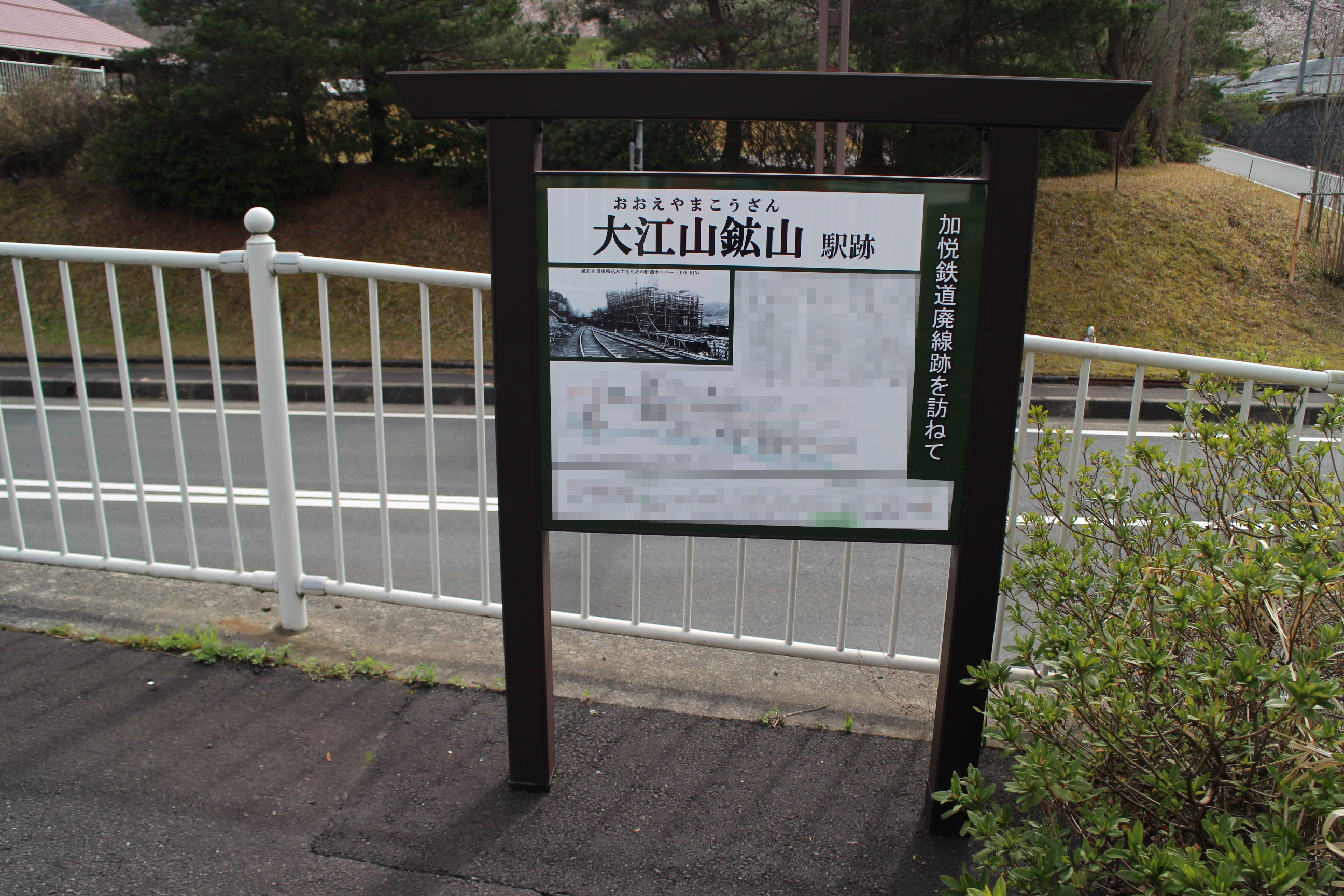 大江山鉱山駅跡の看板